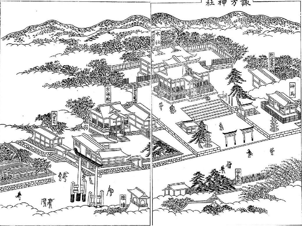 三国名勝図会第三巻に掲載されている南方神社（別名：諏訪神社）の江戸時代ごろの絵図。